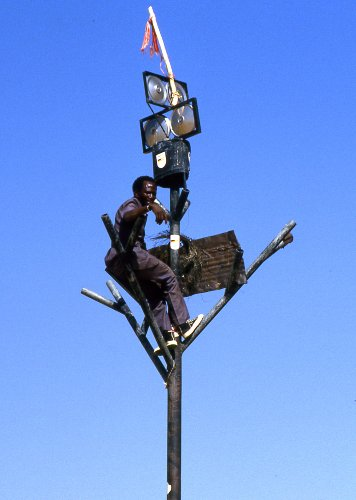 Die „Besteigung“ des neuen (stählernen) Arbre du Ténéré in der Ténéré-Wüste, Niger.